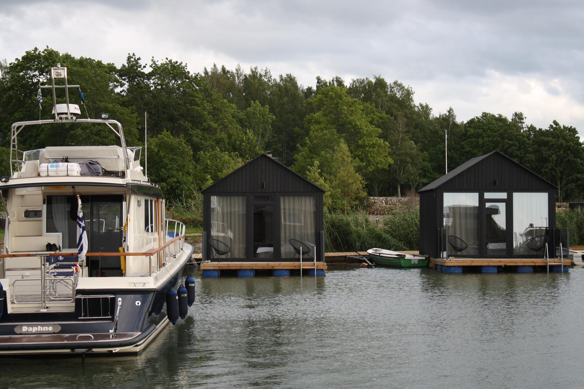 Koguva sadam ja ujuvmajad